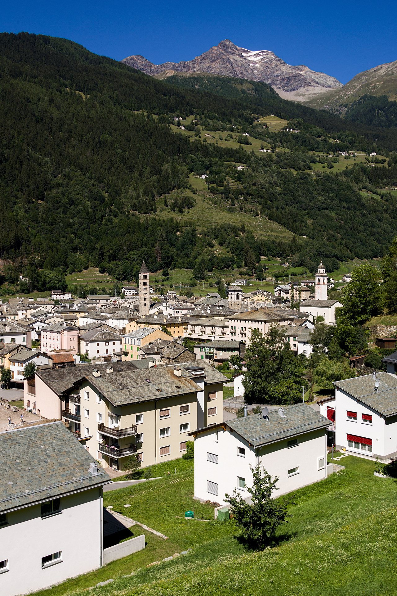 Poschiavo (GR)